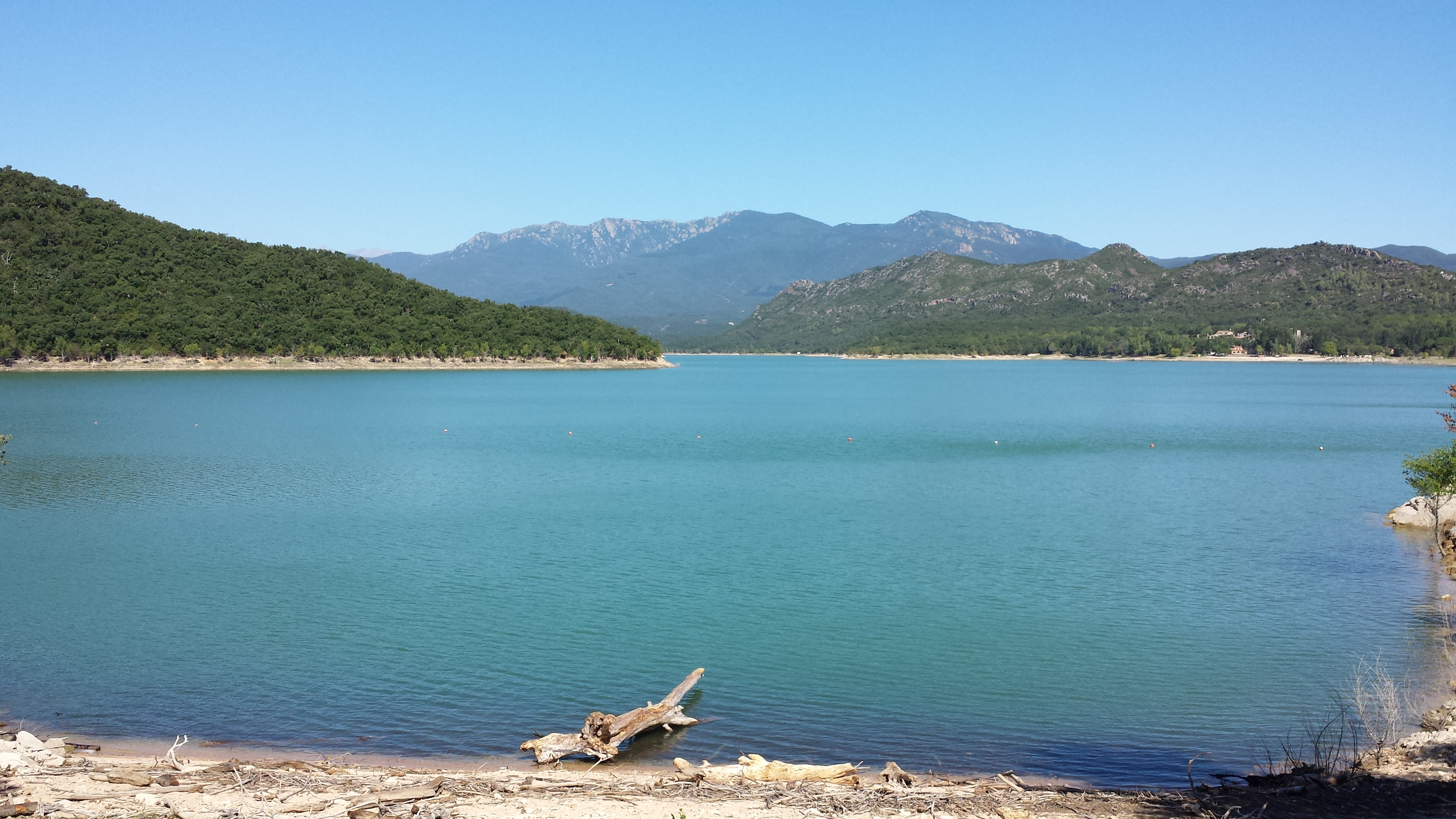 Panta de Boadella